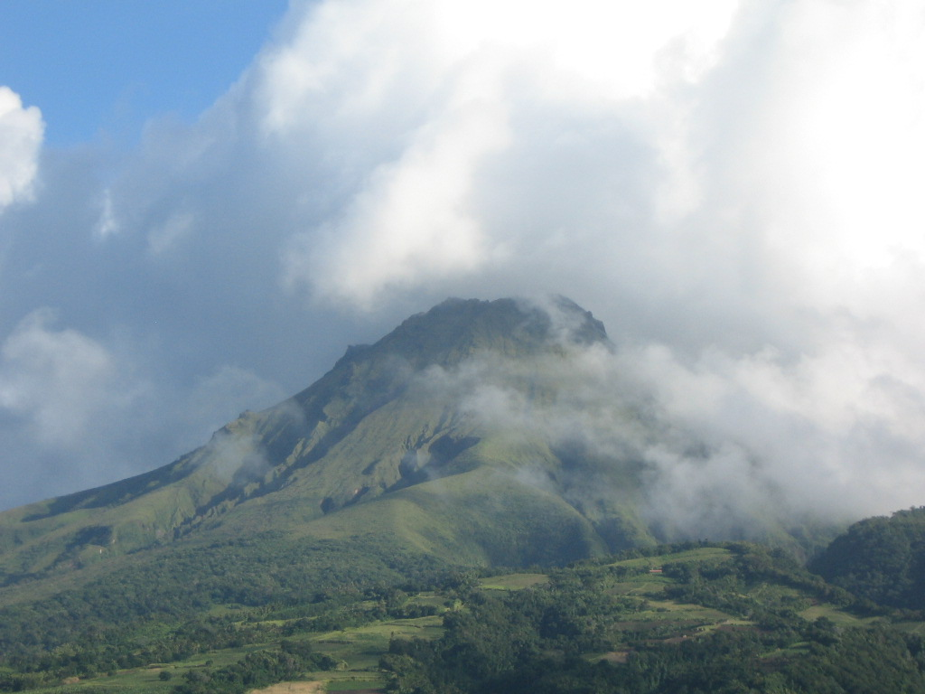 Sommet de la montagne Pelée dans les nuages (Martinique)